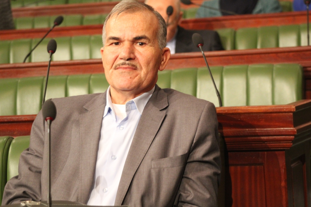 Moncef Ben Salem, ministre de l'Enseignement supérieur et de la Recherche scientifique dans le gouvernement de Hamadi Jebali, siégeant au sein de l'assemblée constituante